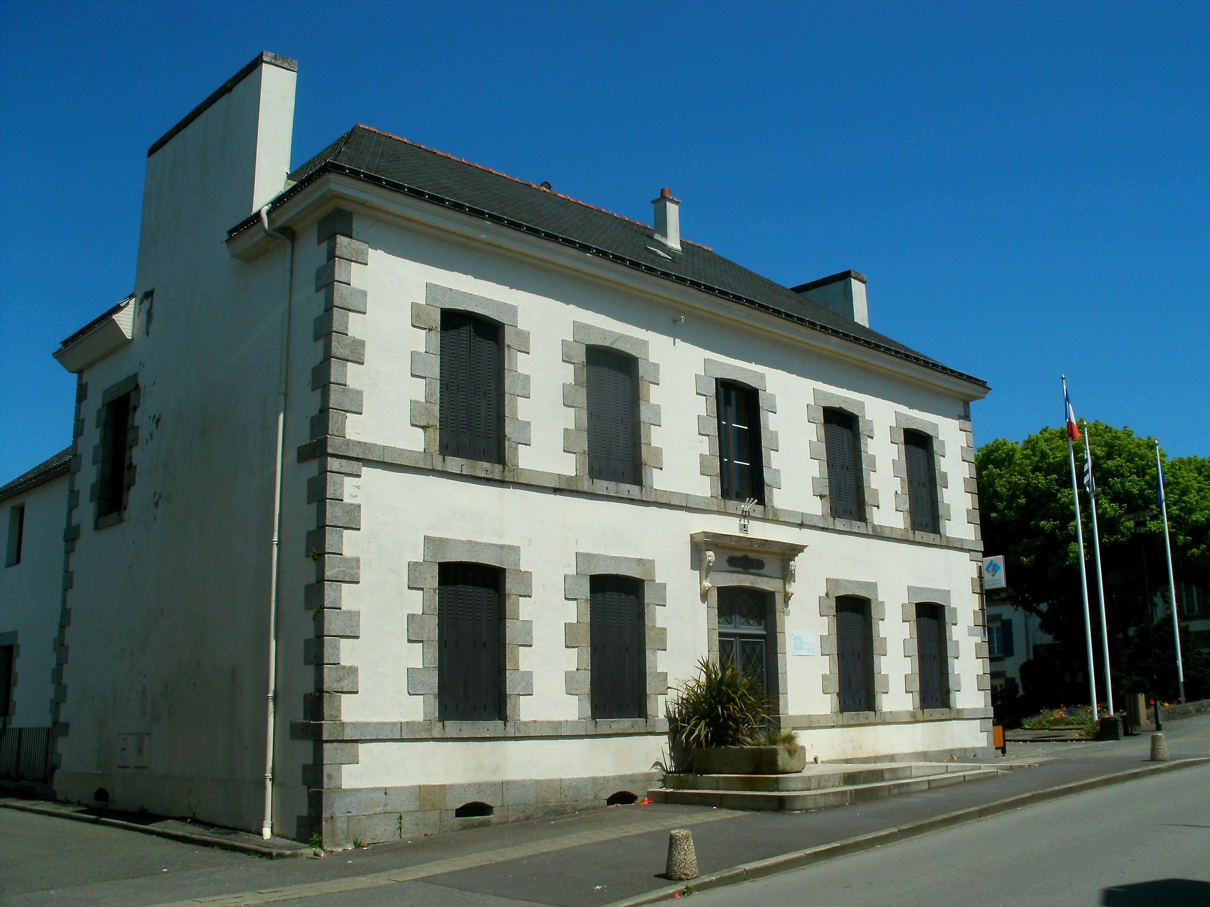 Ancienne entrée de la mairie (XIXe siècle).